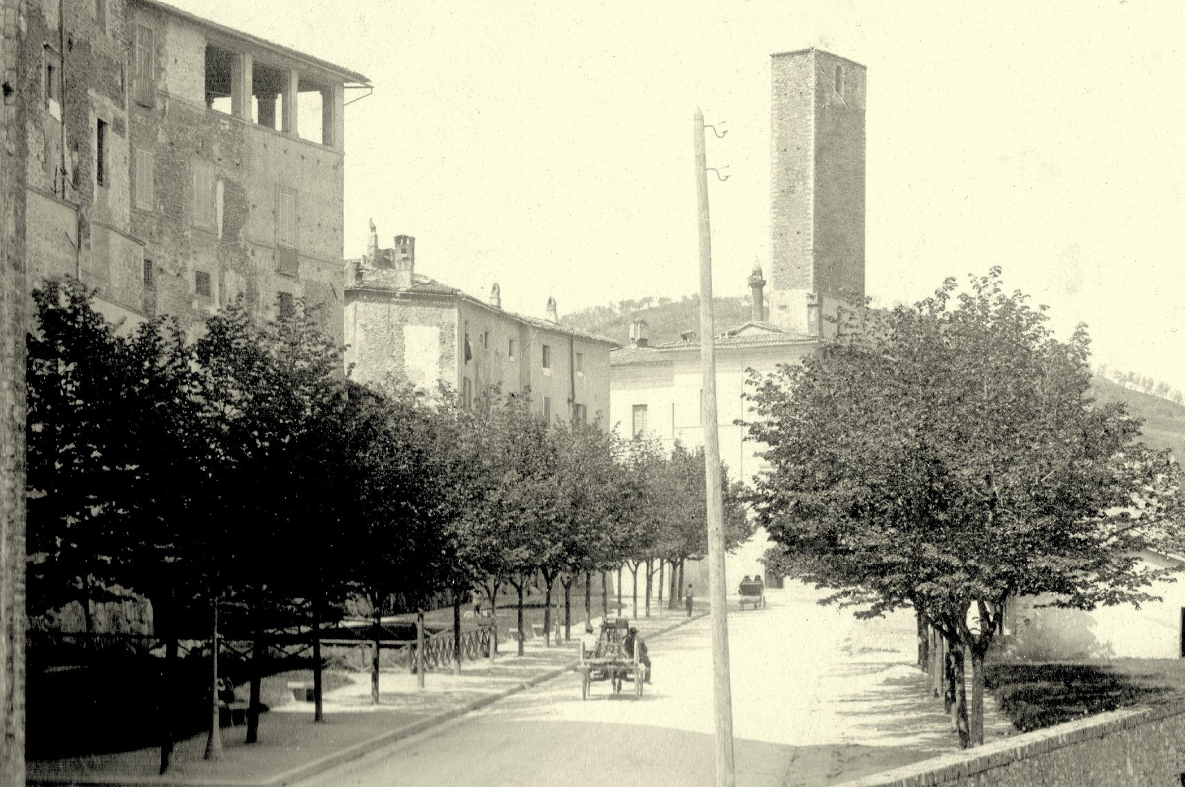 La torre dell'Olio di Spoleto, 1912